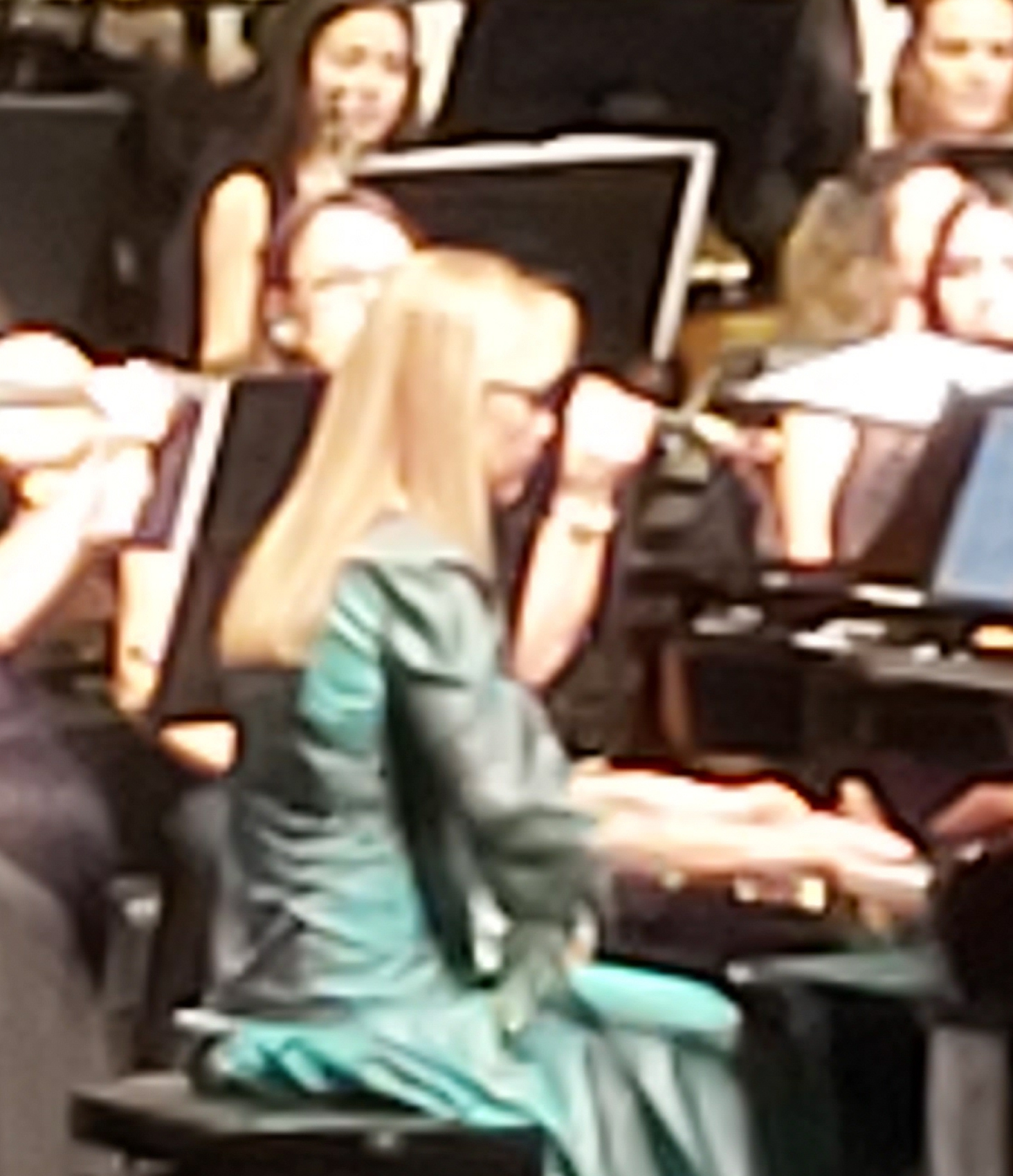 Hande Dalkılıç, 2020